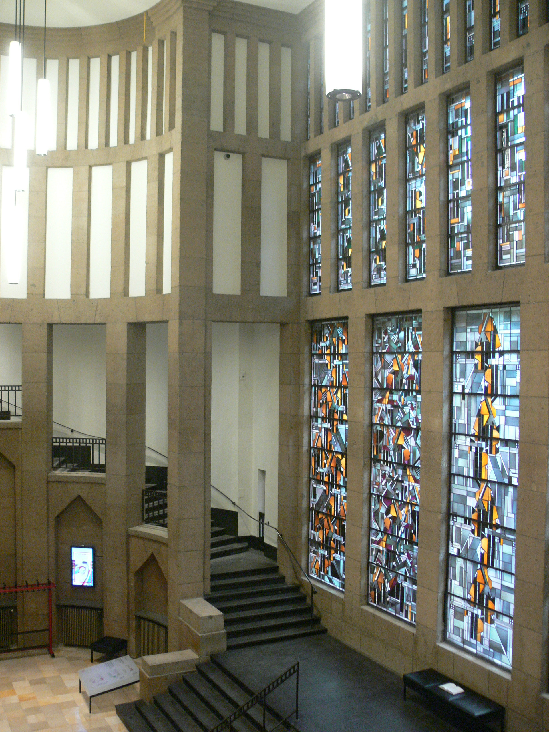 Museum kunst Palast à Düsseldorf, les vitraux du hall principal